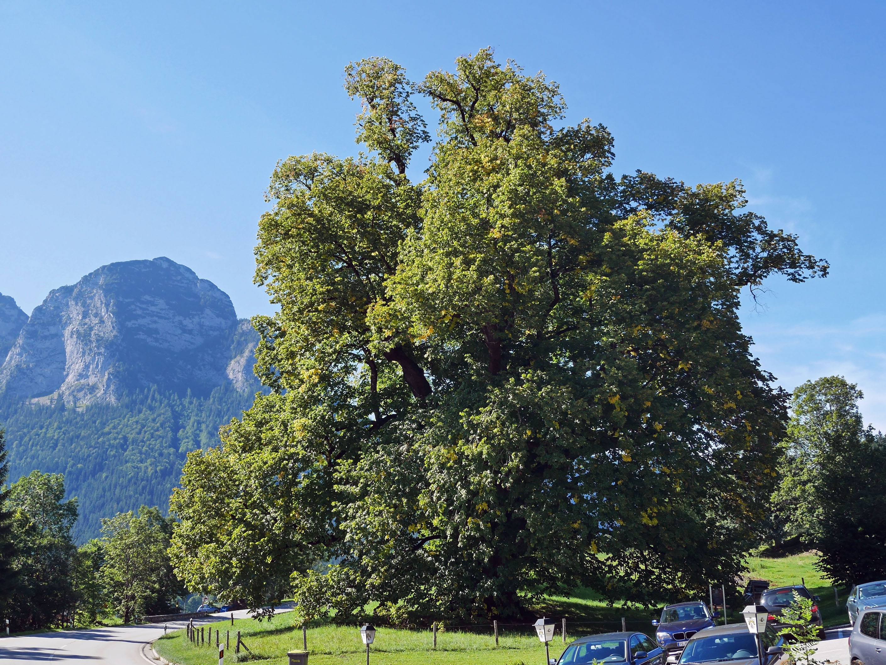 Hindenburglinde